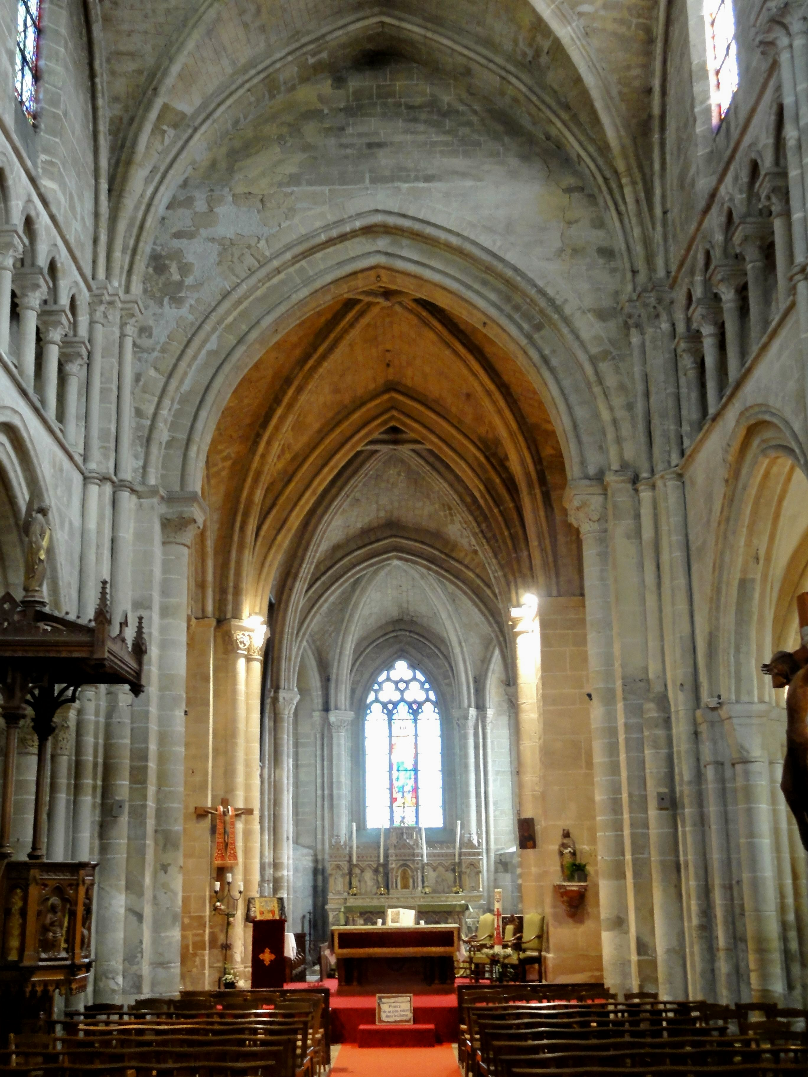 Vue dans le chœur depuis la nef.